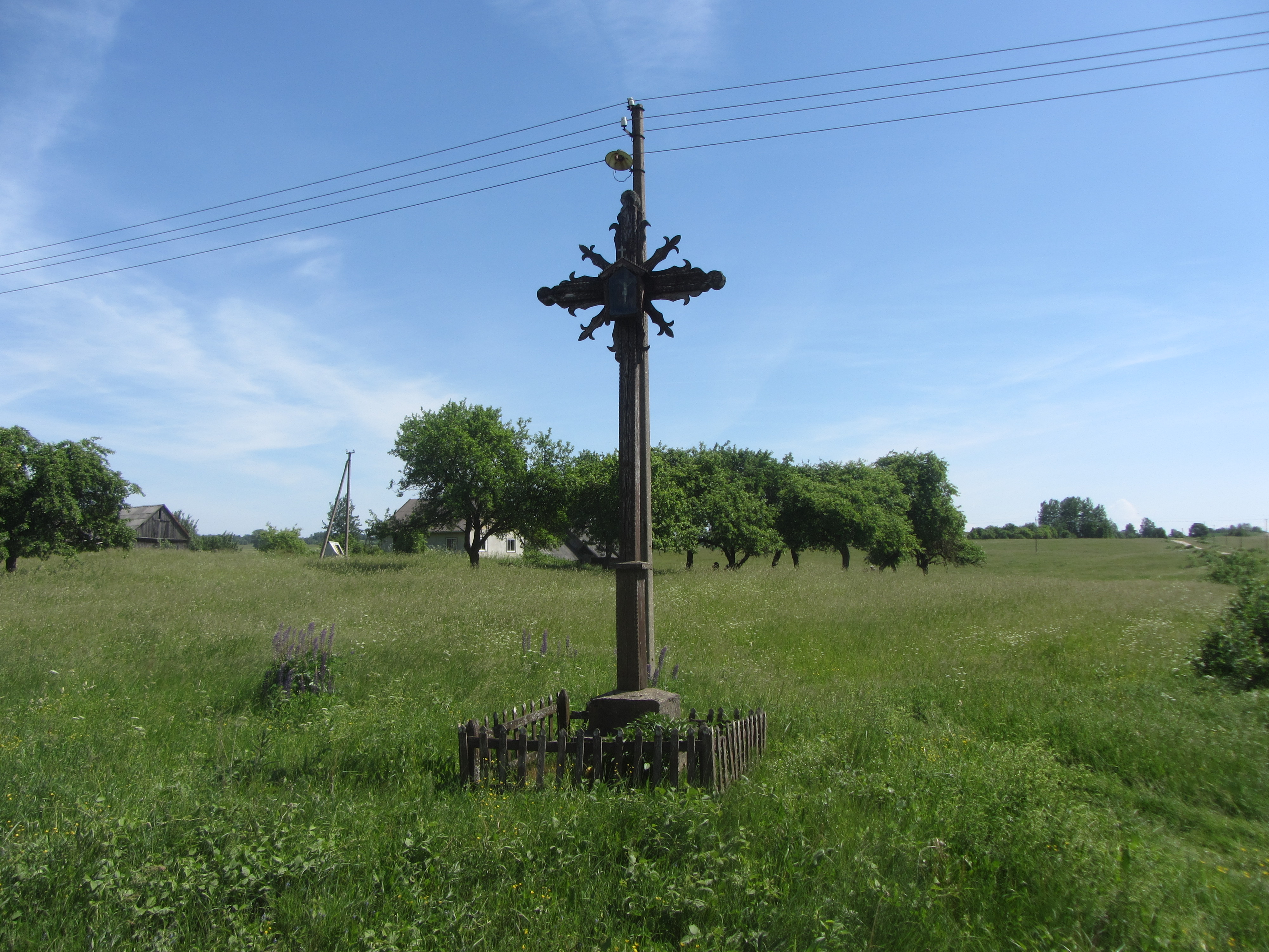 Alšininkai, Lithuania